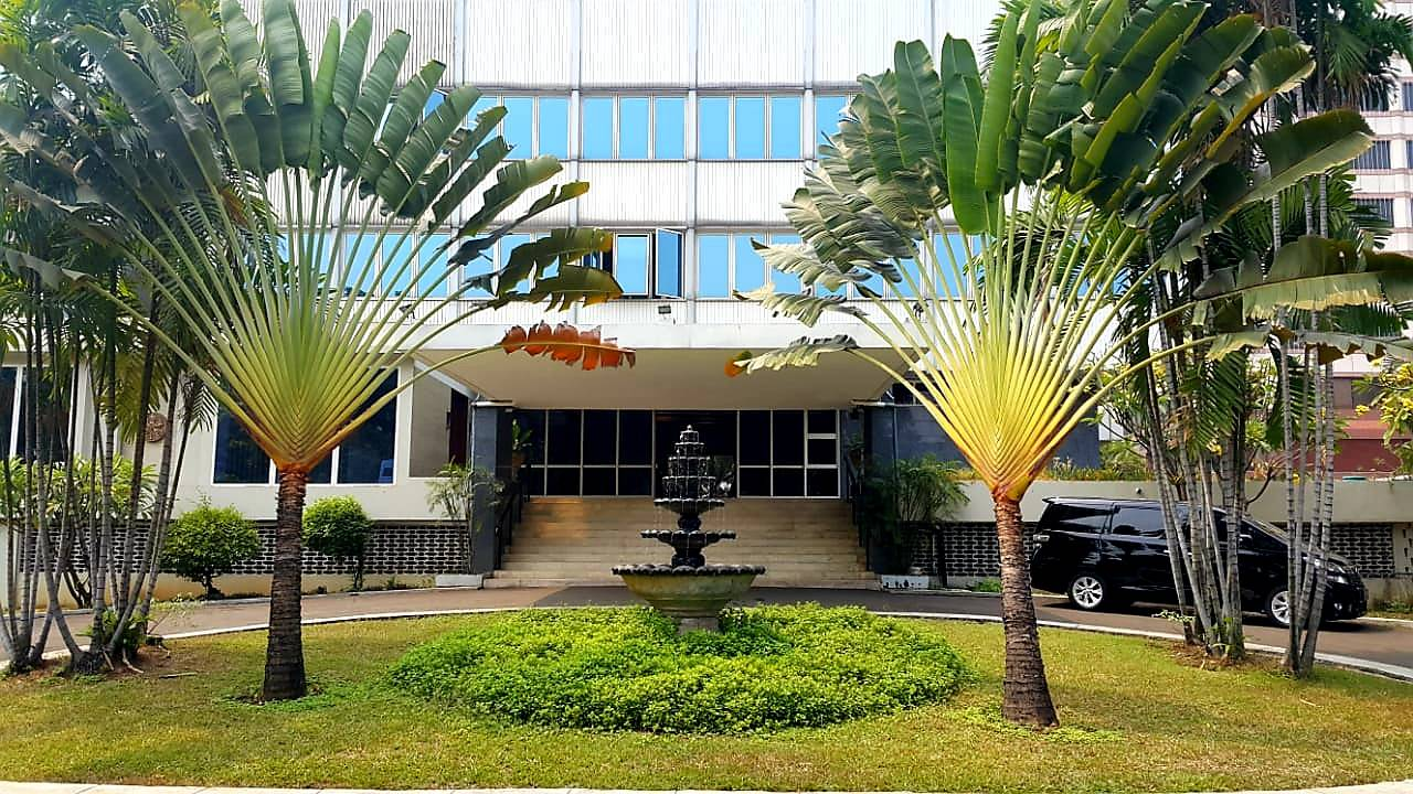 Kedutaan Tahta Suci Vatikan di Jakarta, Indonesia